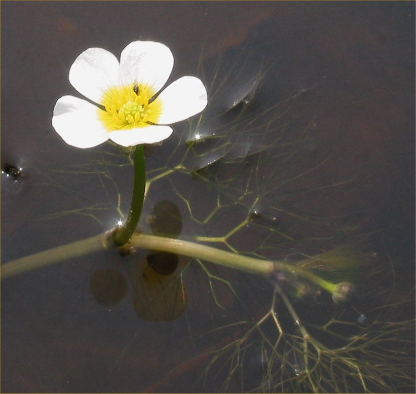 (nl: Fijne waterranonkel) Ranunculus aquatilis var. diffusus